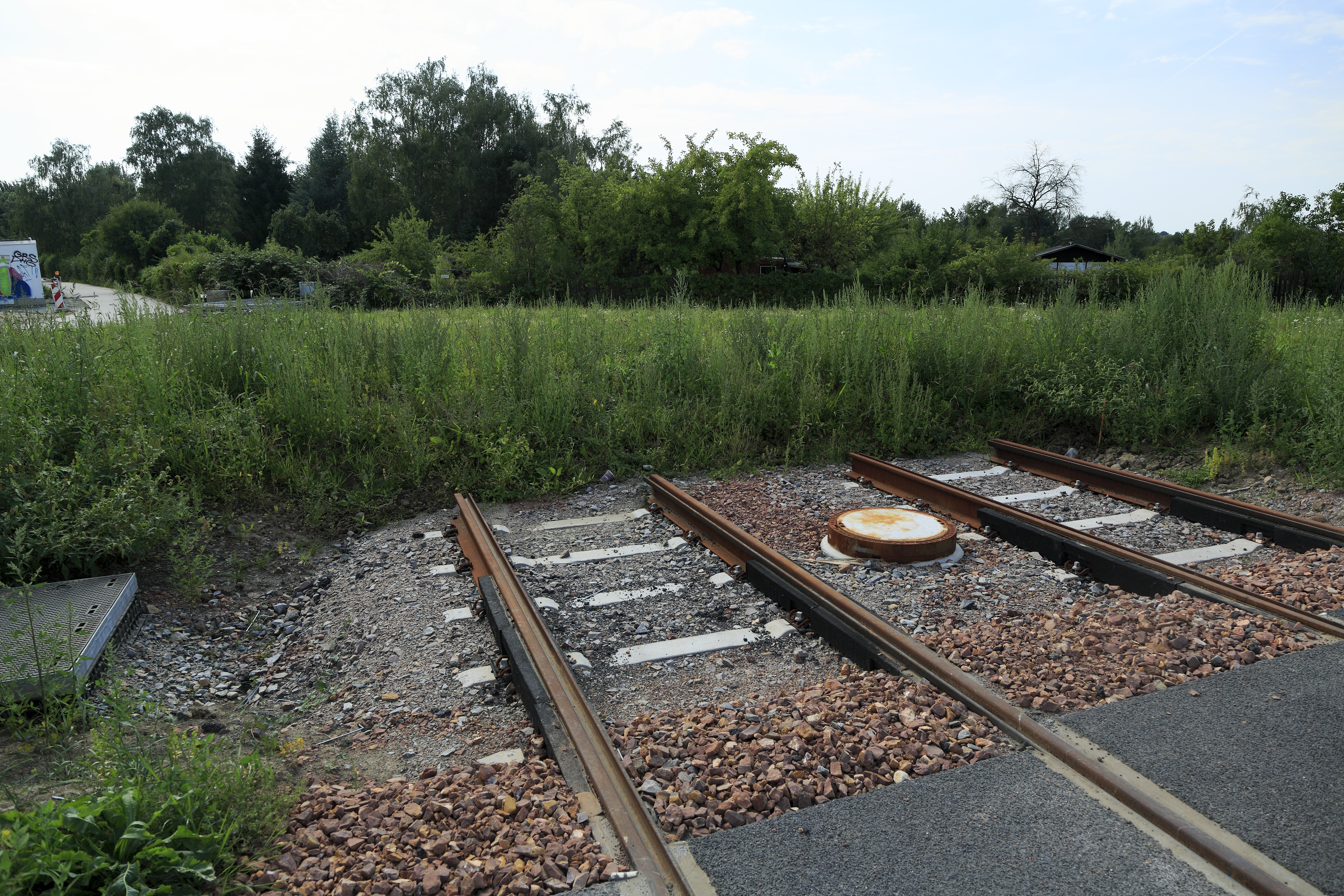 Richtung Reichenhain hinter der Fraunhoferstraße, die ebenfalls erst mit dem Neubau der Strecke entstanden ist. Die Überwege wurden gleich mit eingebaut. Bis zur Einbindung in das Fernbahnnetz fehlen etwa zweihundert bis dreihundert Meter. Die Rillenschienen sind wie auf der gesamten Neubaustrecke ab der Bernsdorfer Straße ein Fernbahnprofil mit größerer Rillenweite.